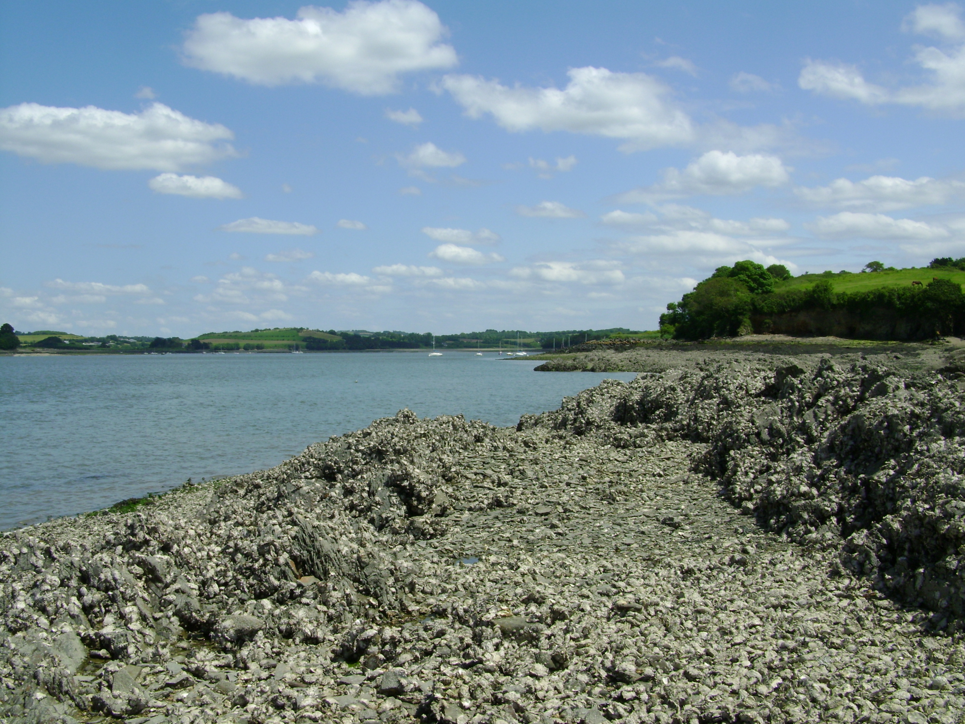 Logonna-Daoulas, prolifération de la C. gigas.JPG